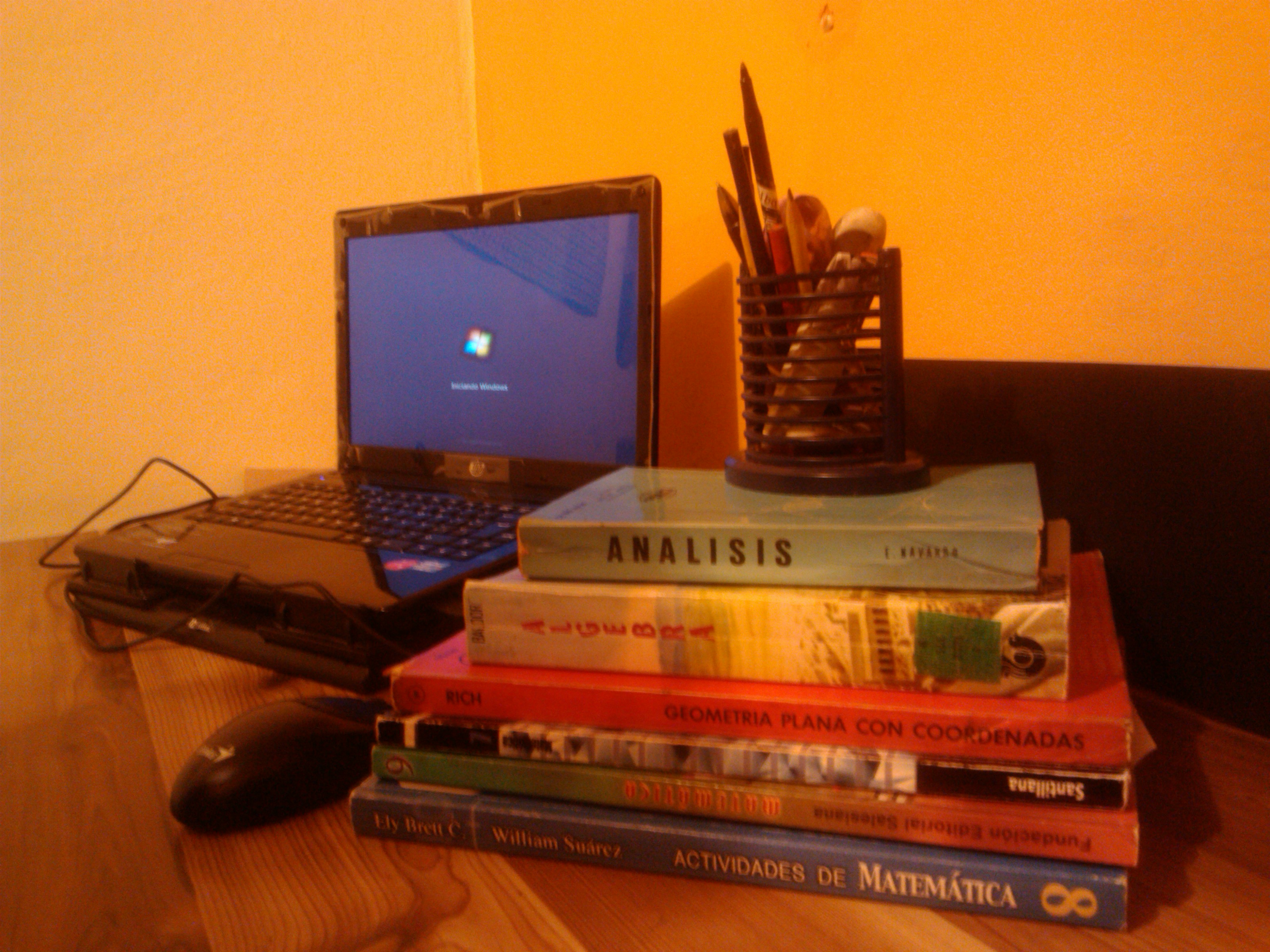 Herramientas de mi trabajo, lapto, libros referentes al área de matemáticas, porta lapices.